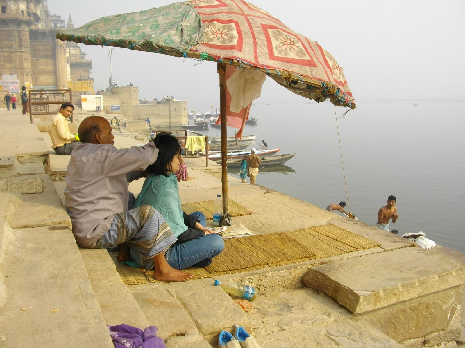 頭・首・肩の20分で50ルピー（100円）